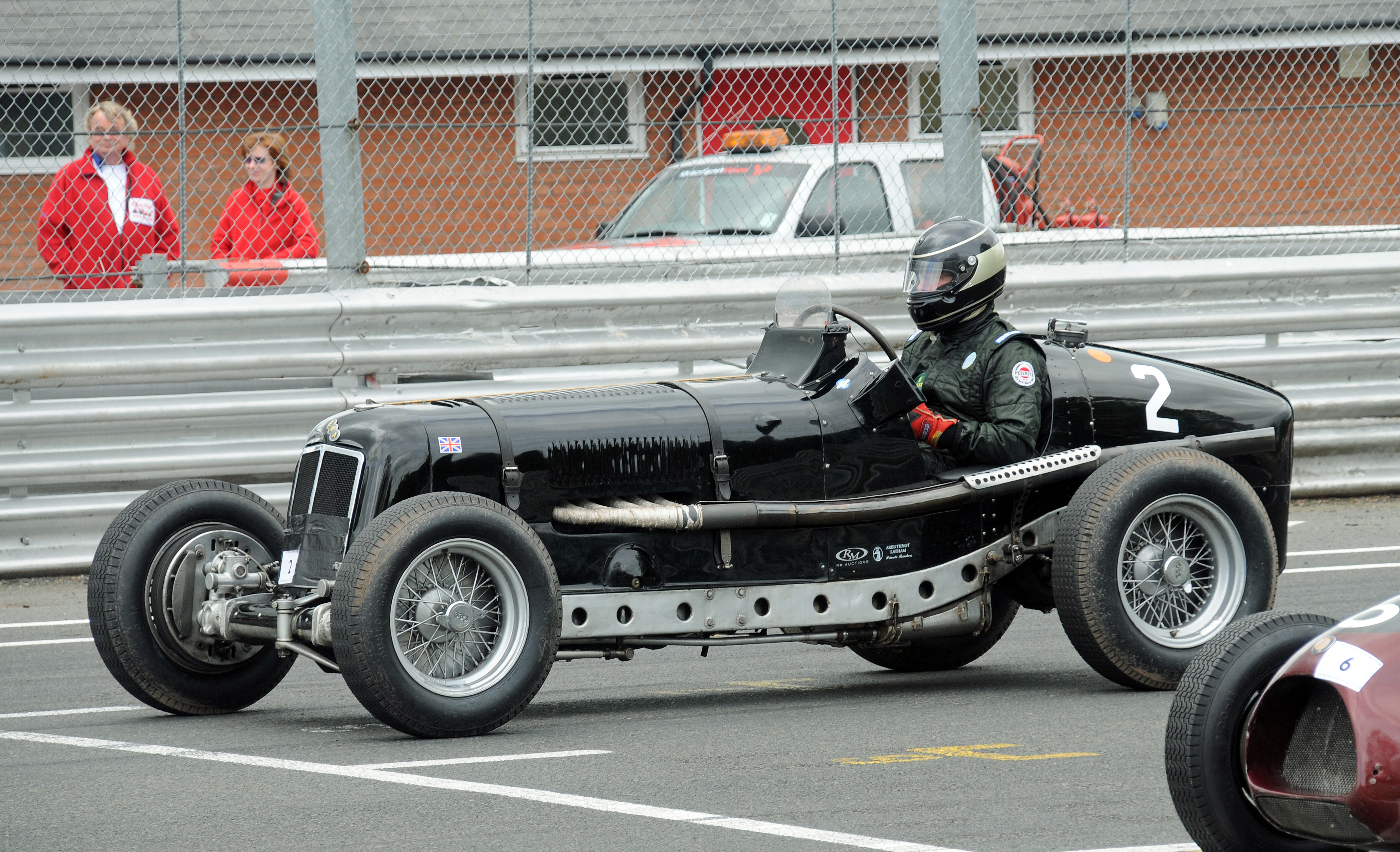 1938 era r4d